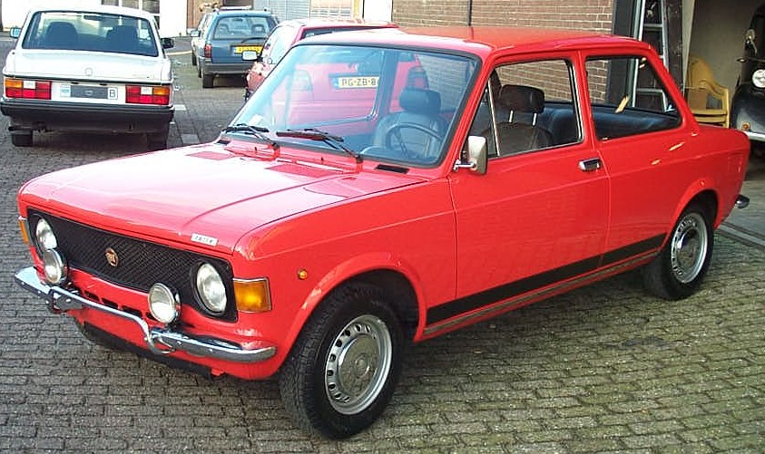 Fiat 128 Rallye - Probabile trasformazione artigianale in "Rally" di una Fiat 128 2p